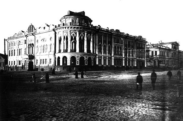 Окружной суд (дом Севастьянова) на Главном проспекте в начале XX в.